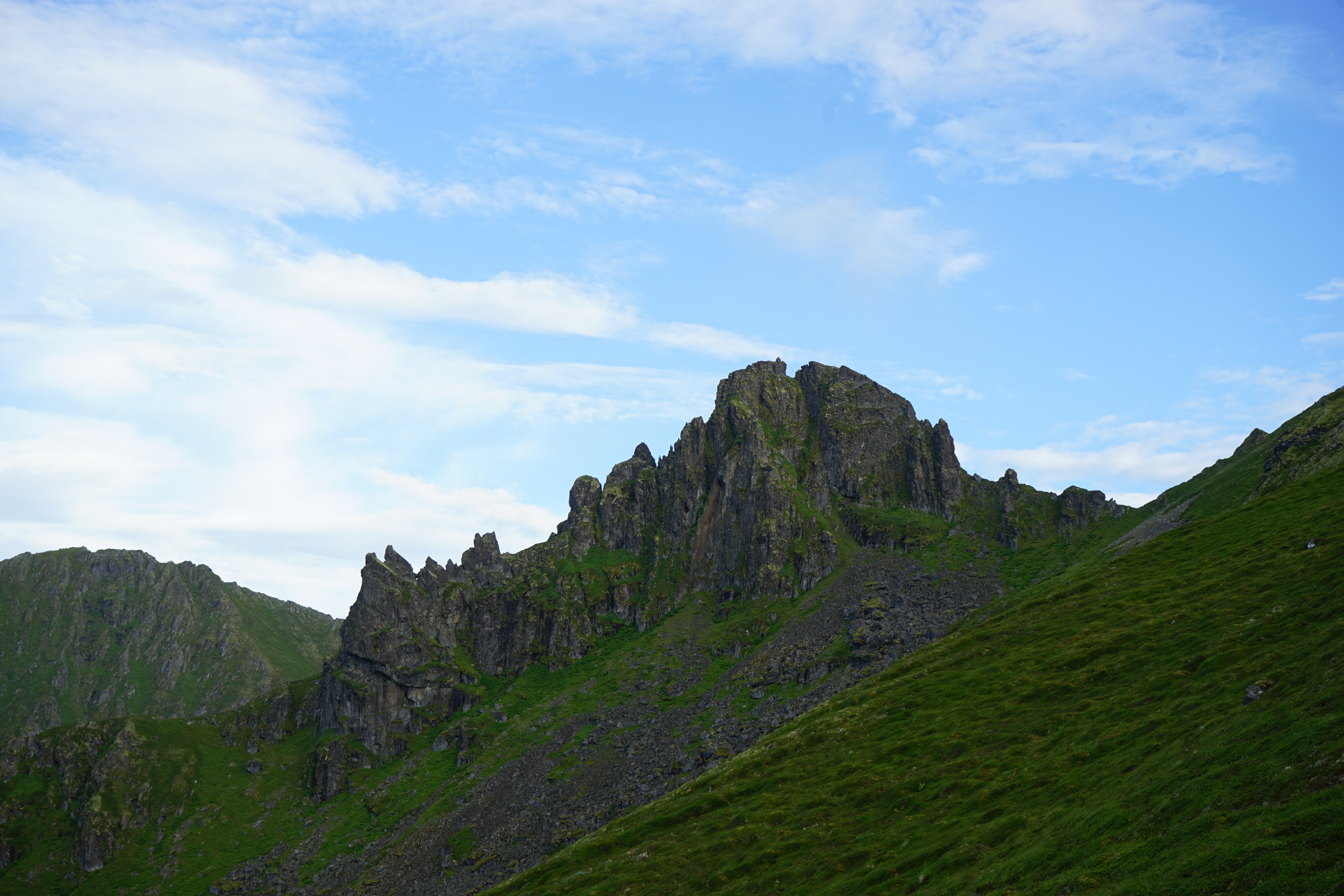 Fjellet Tanipa(572 moh)